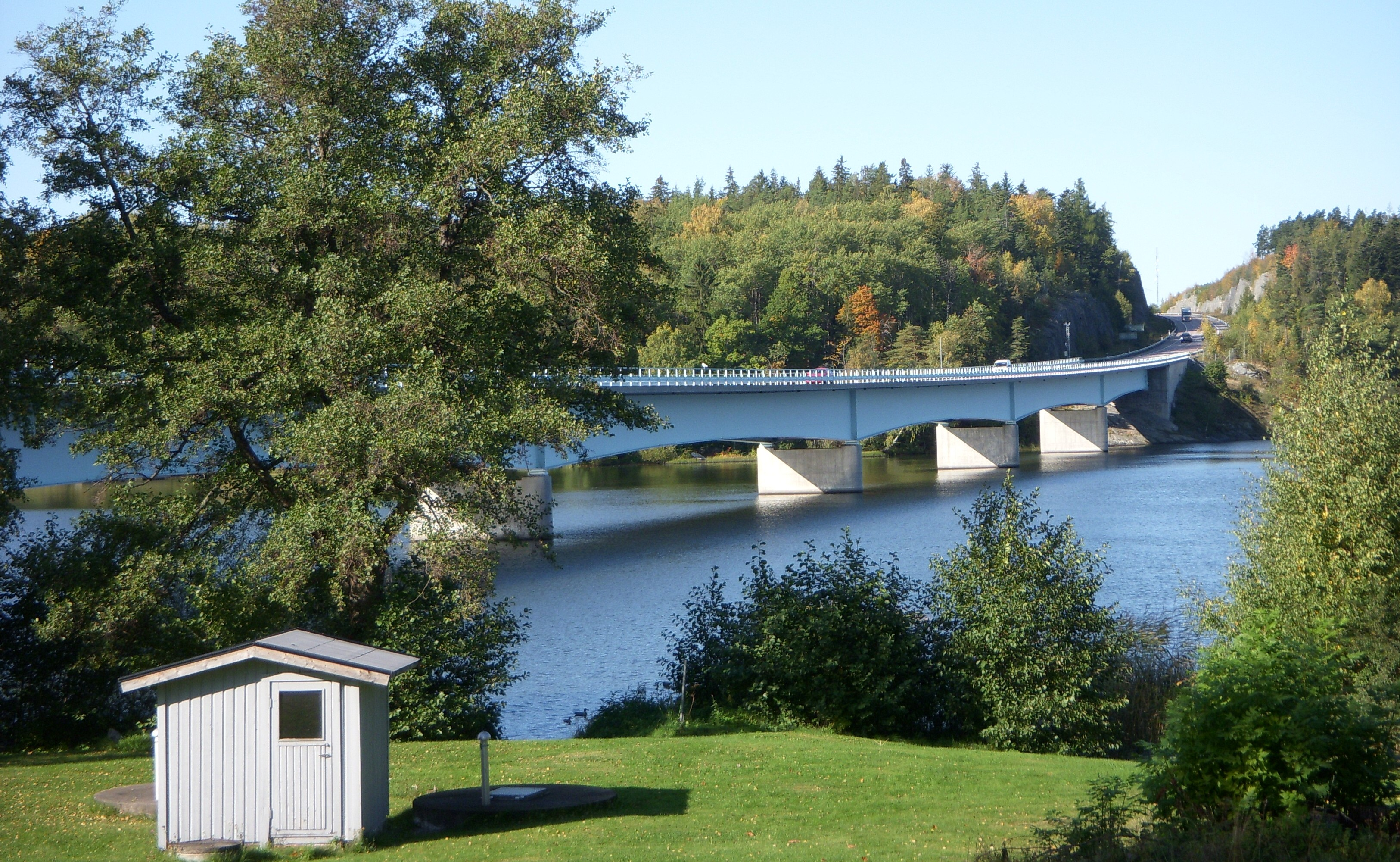 Ekolsundsbron (södra) i Enköpings kommun